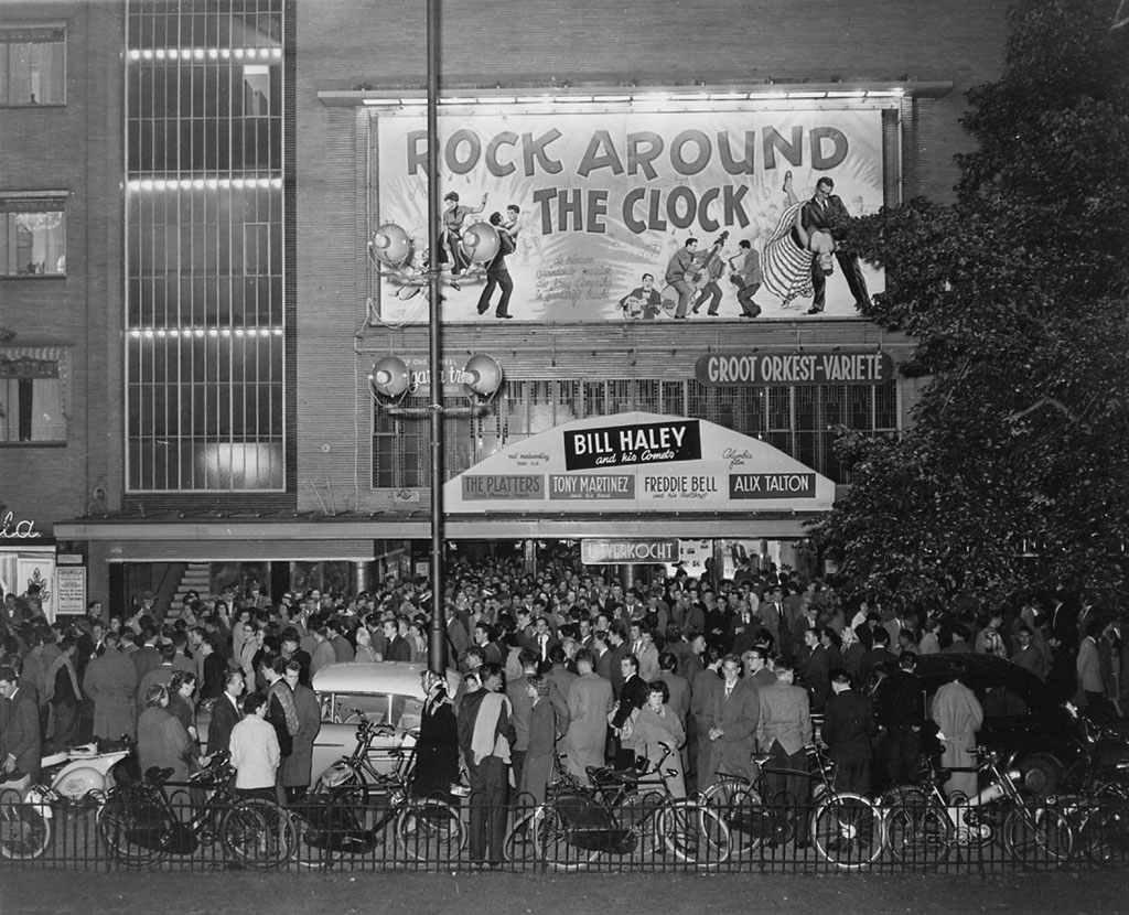 Drukte bij het uitgaan van de film 'Rock around the clock' met Bill Haley, City Theater, Kleine Gartmanplantsoen, Amsterdam, 1 september 1956. Foto Ben van Meerendonk / AHF, collectie IISG, Amsterdam..